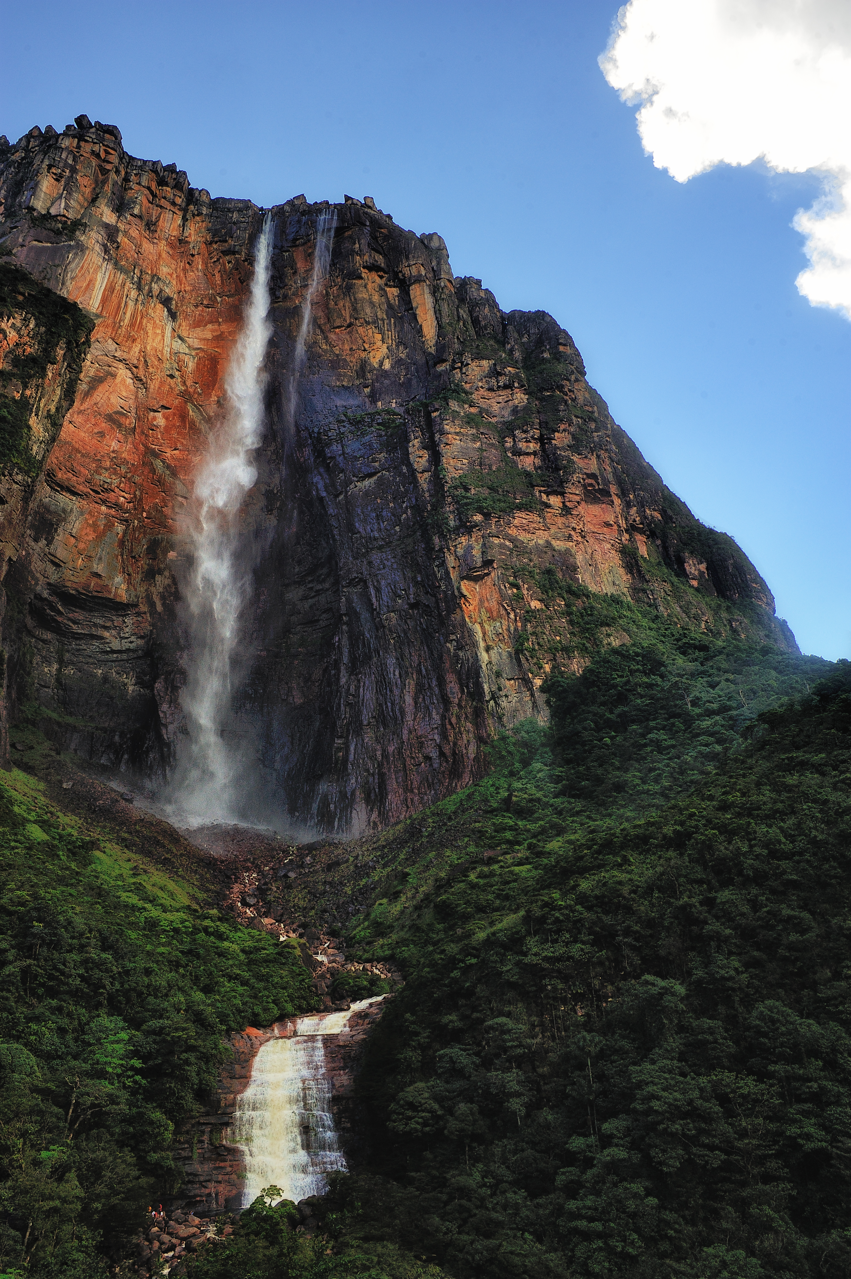 Vista del Salto Ángel en el Parque Nacional Canaima, Venezuela.